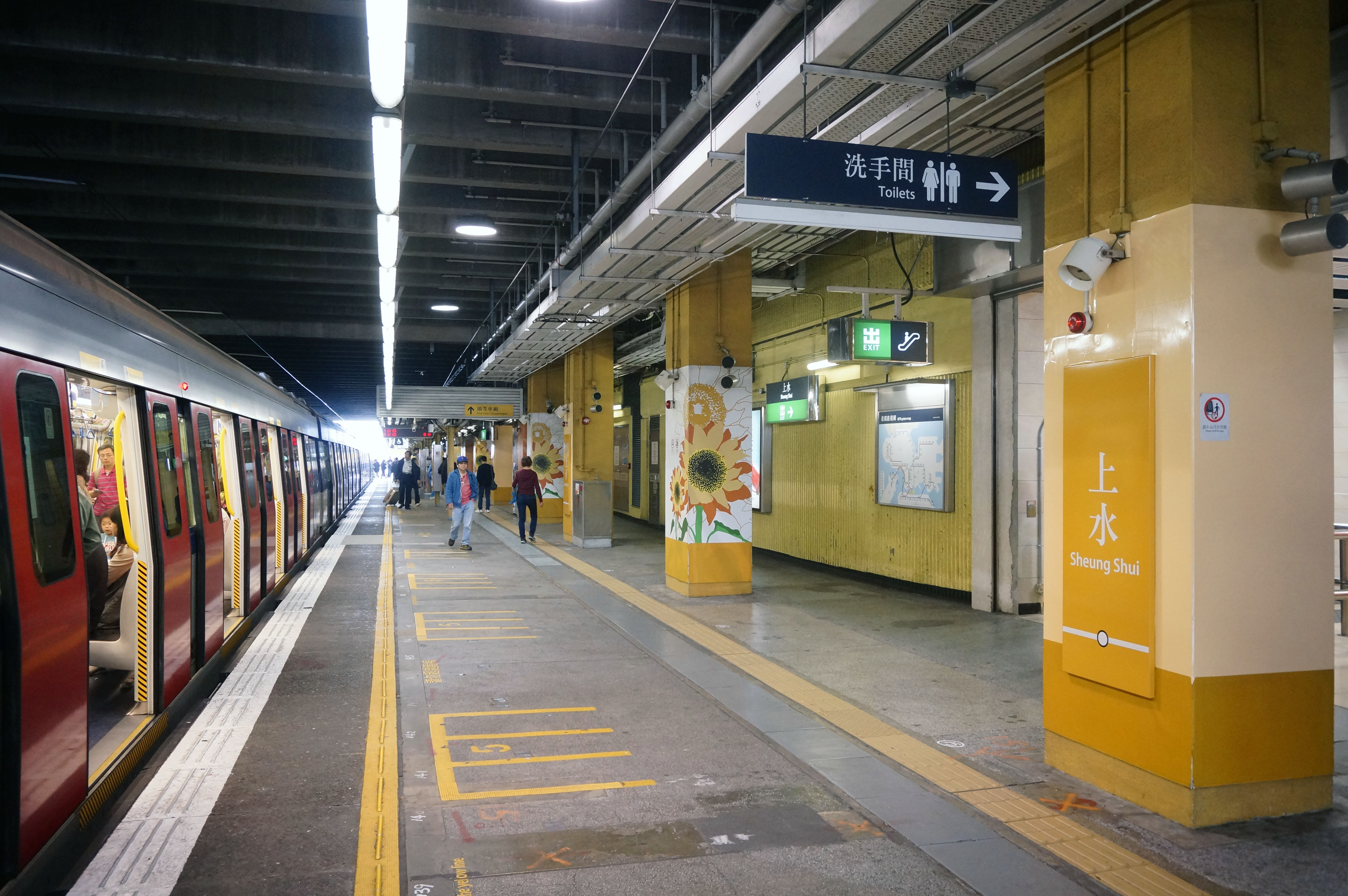 港鐵上水站月台